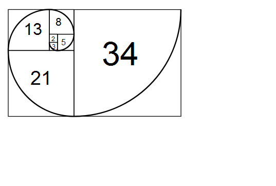 Spirale de Fibonacci